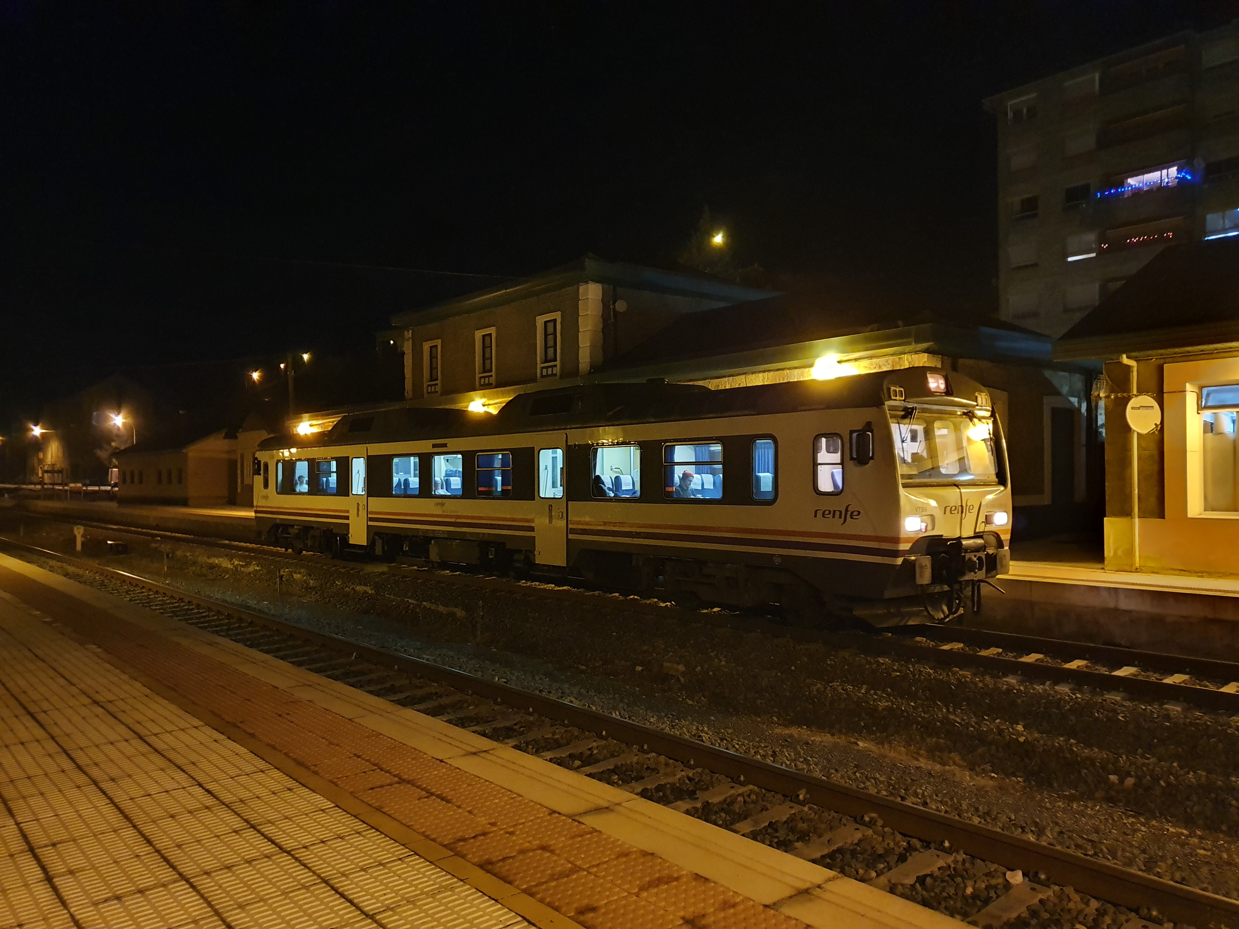 Sabiñanigo